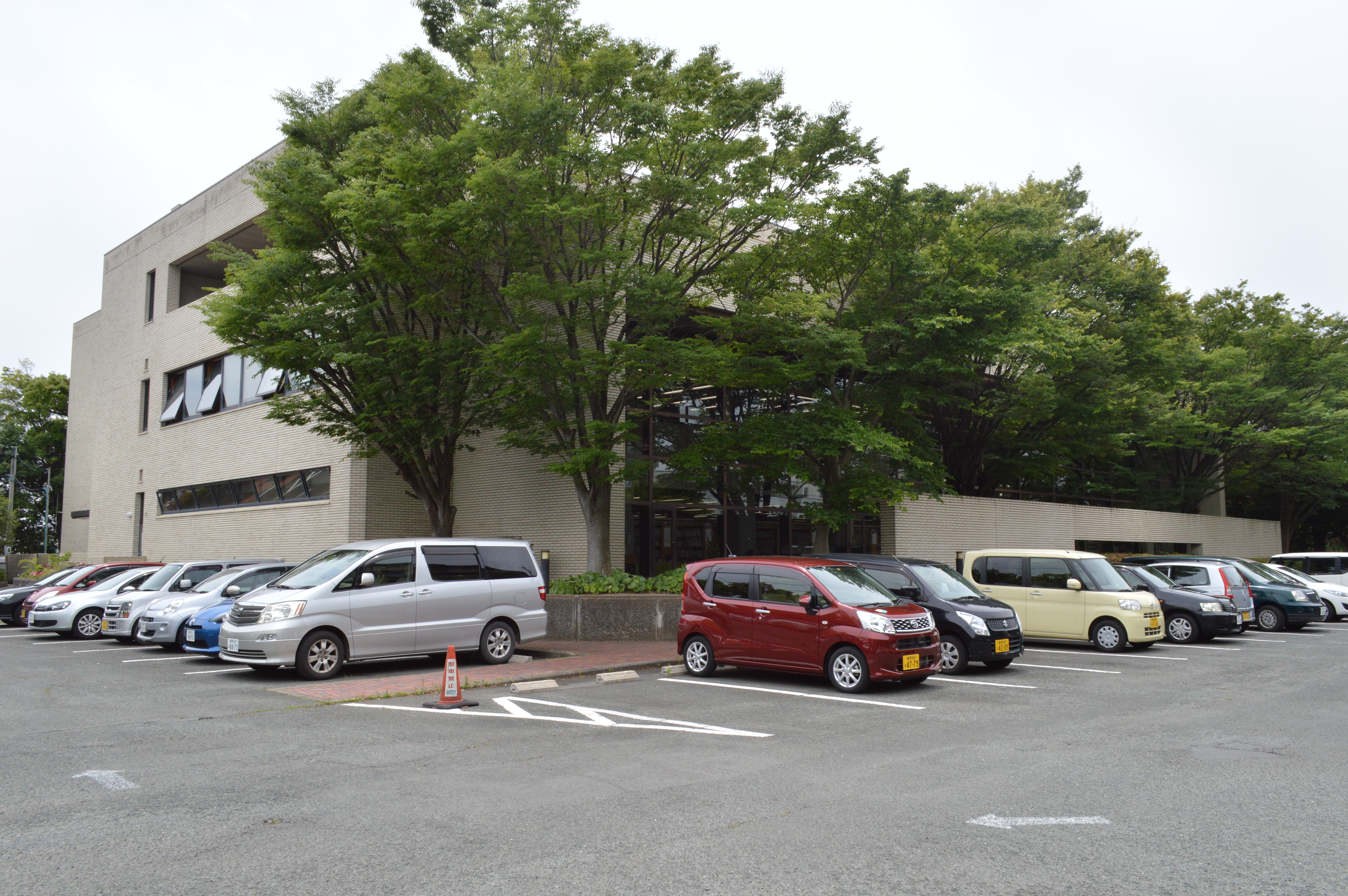 豊橋市中央図書館（豊橋市図書館）